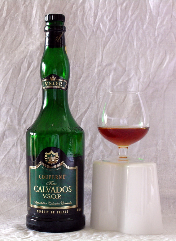 Calvados from Calvados, Normandy.